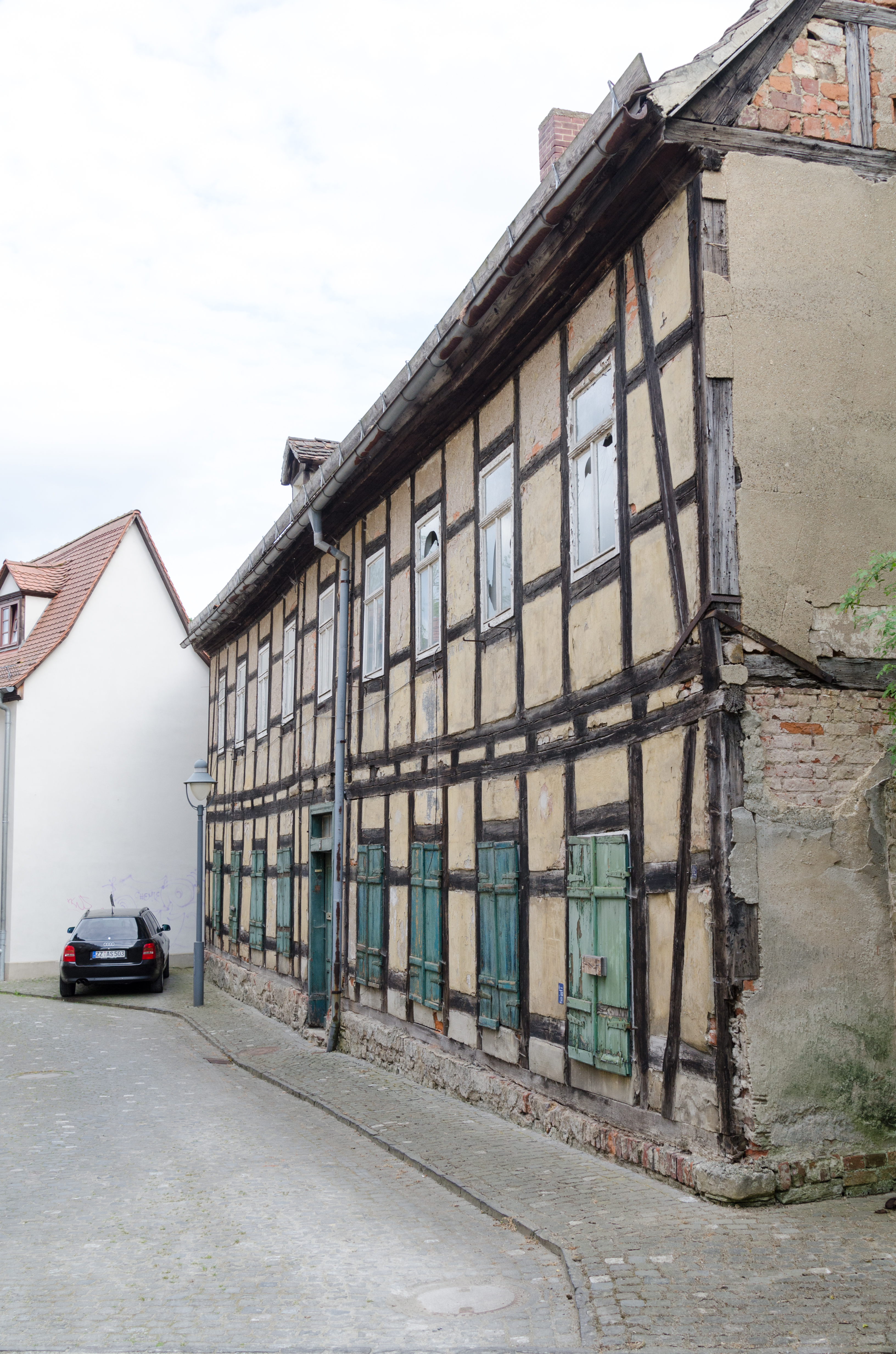 Zeitz, Steinsstraße 5